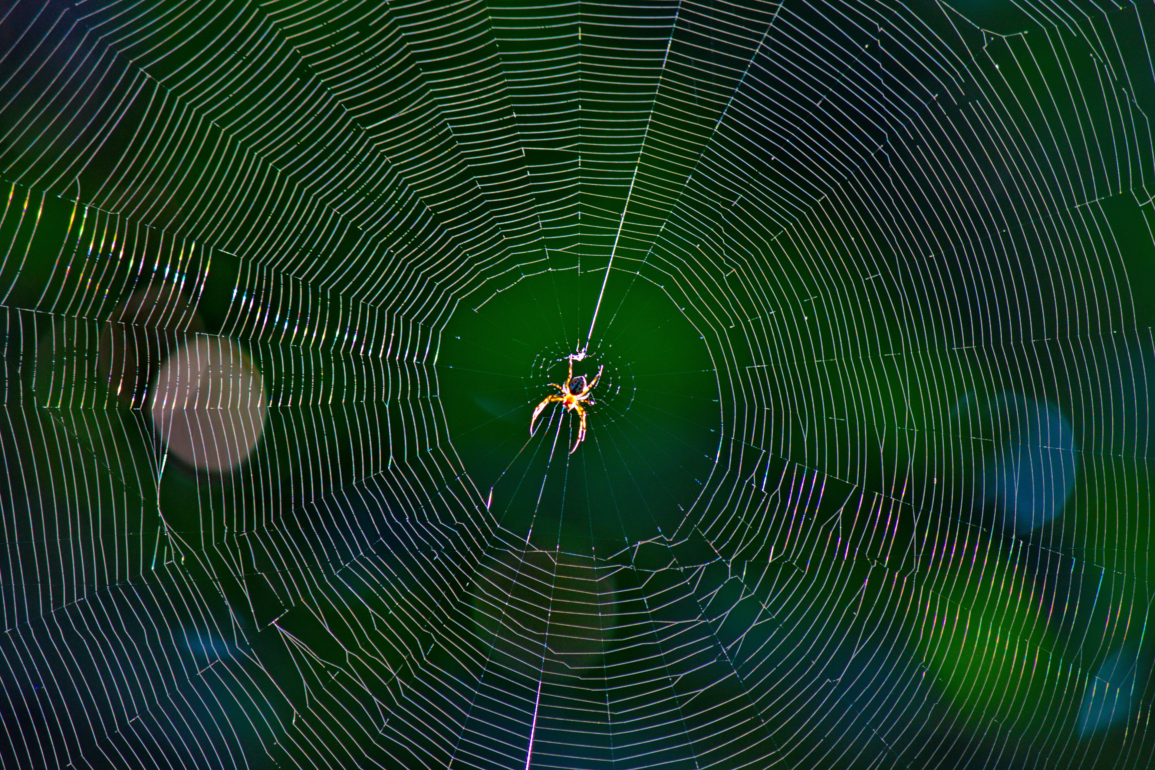 লাউয়াছড়া জাতীয় উদ্যান